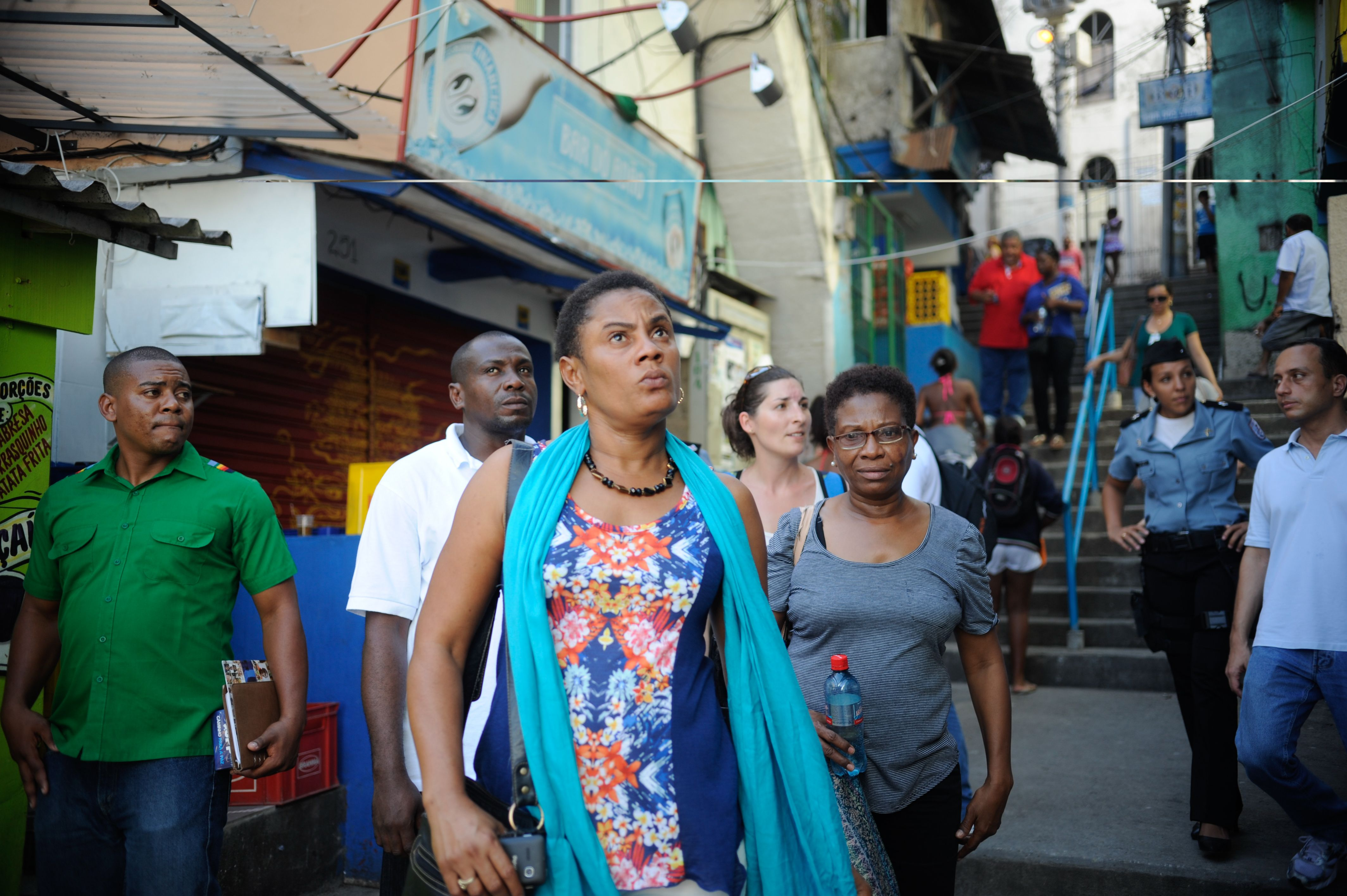 Rio de Janeiro - Cinco oficiais da Força Nacional do Haiti visitaram a instalação da UPP, na favela Dona Marta, zona sul da cidade (Tomaz Silva/Agência Brasil)